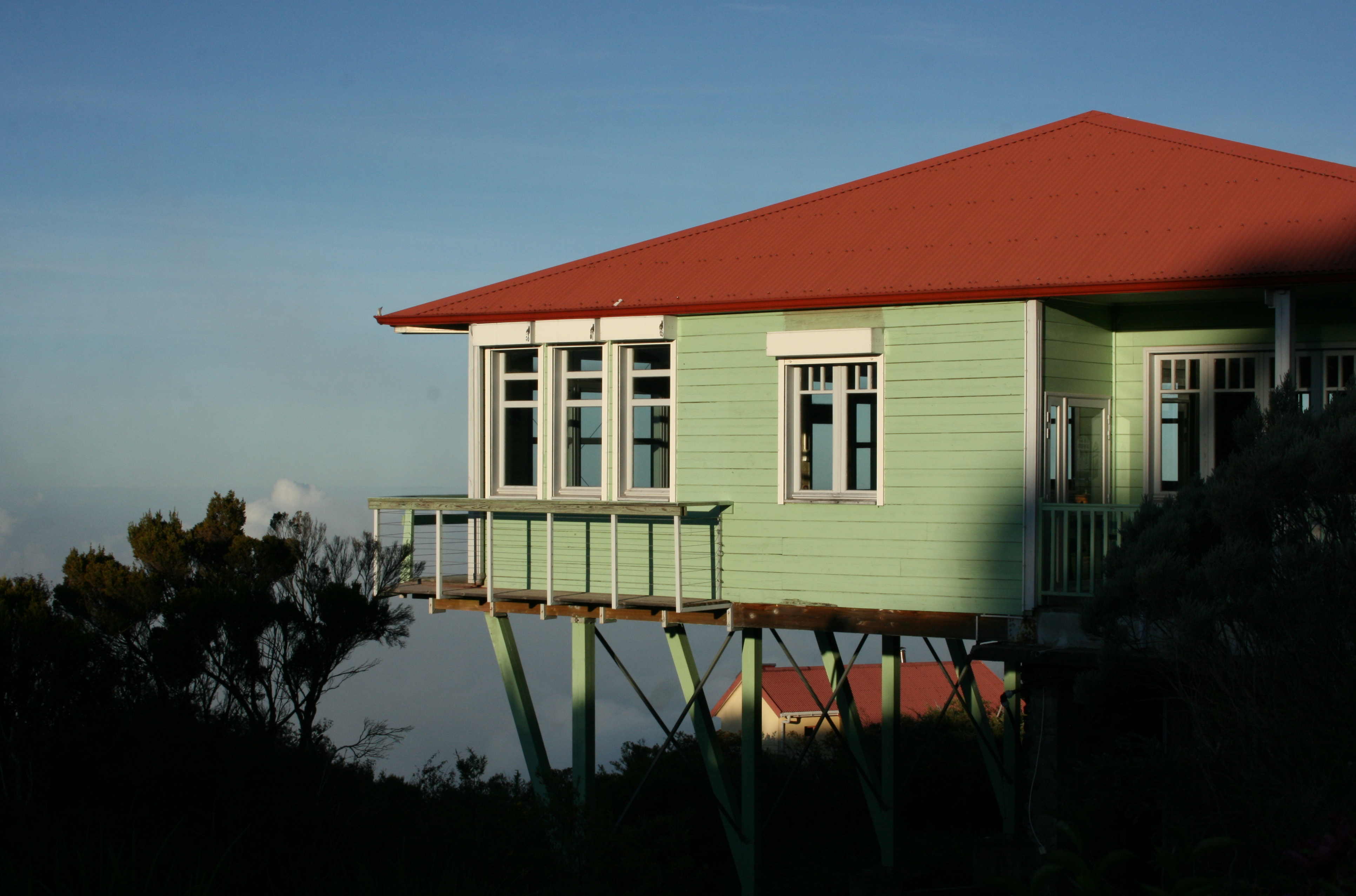 Vue d'un bâtiment du gîte du Volcan en fin d'après-midi.